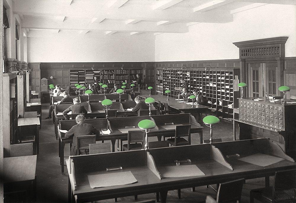 Lesesalen ved Hovedbiblioteket, NTH, 1915. I dag holder Teknologibiblioteket, et av NTNU UBs 11 bibliotek, til her. Bildet ble manipulert (fargete lamper) i 2012, for bruk i forbindelse med NTNU UBs jubileum